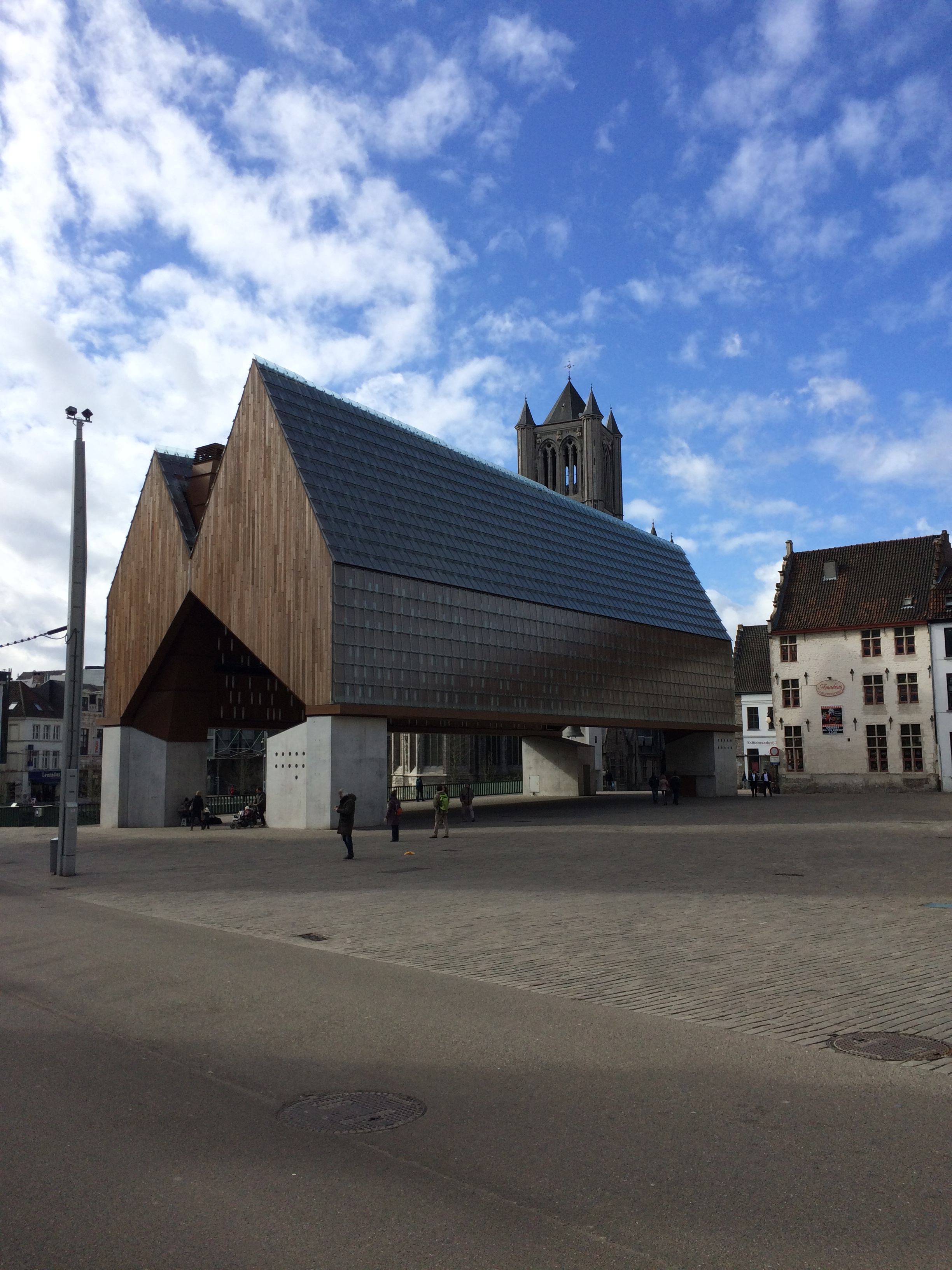 The Stadshal in Ghent, Belgium.